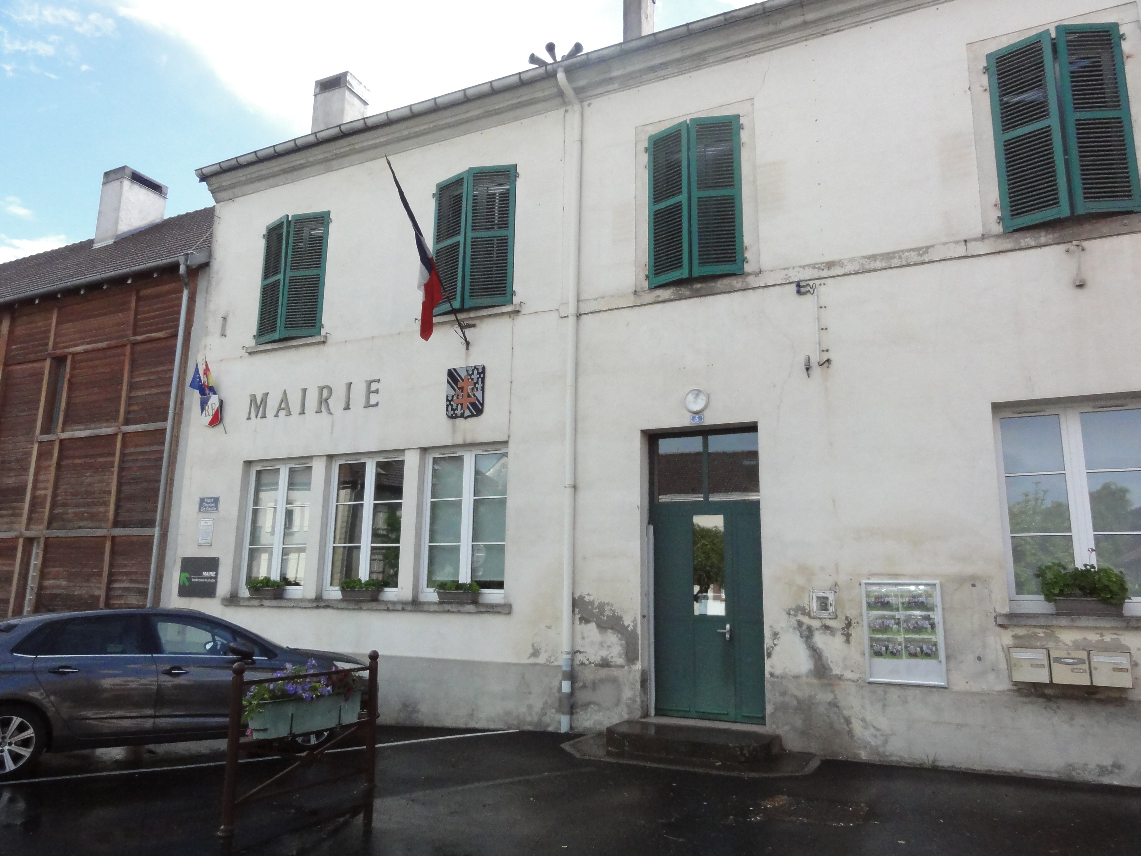 Niderviller (Moselle) mairie